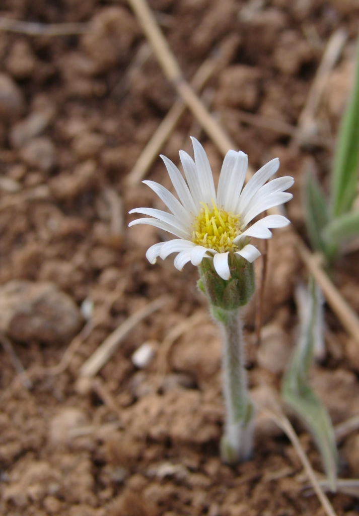 Inulopsis camporum (Gardner) G.L. Nesom - ASTERACEAE - APA da Bacia do Rio São Bartolomeu - Brasília - Distrito Federal - Brasil.